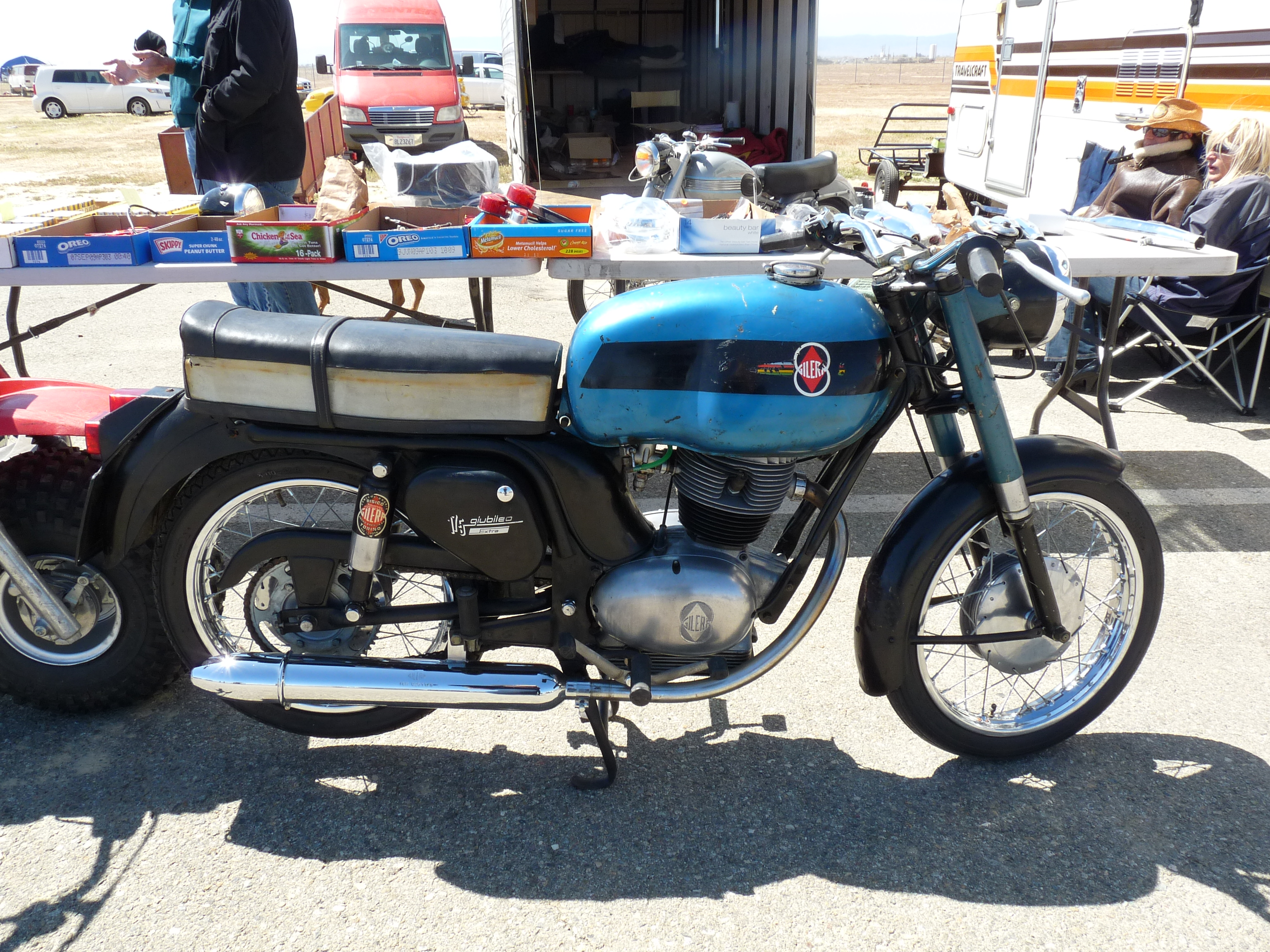 Gilera 175 Giubileo Extra (1960-1965)